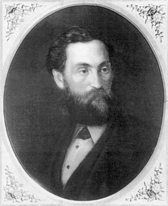 Albín Lhota (1847-1889), český malíř